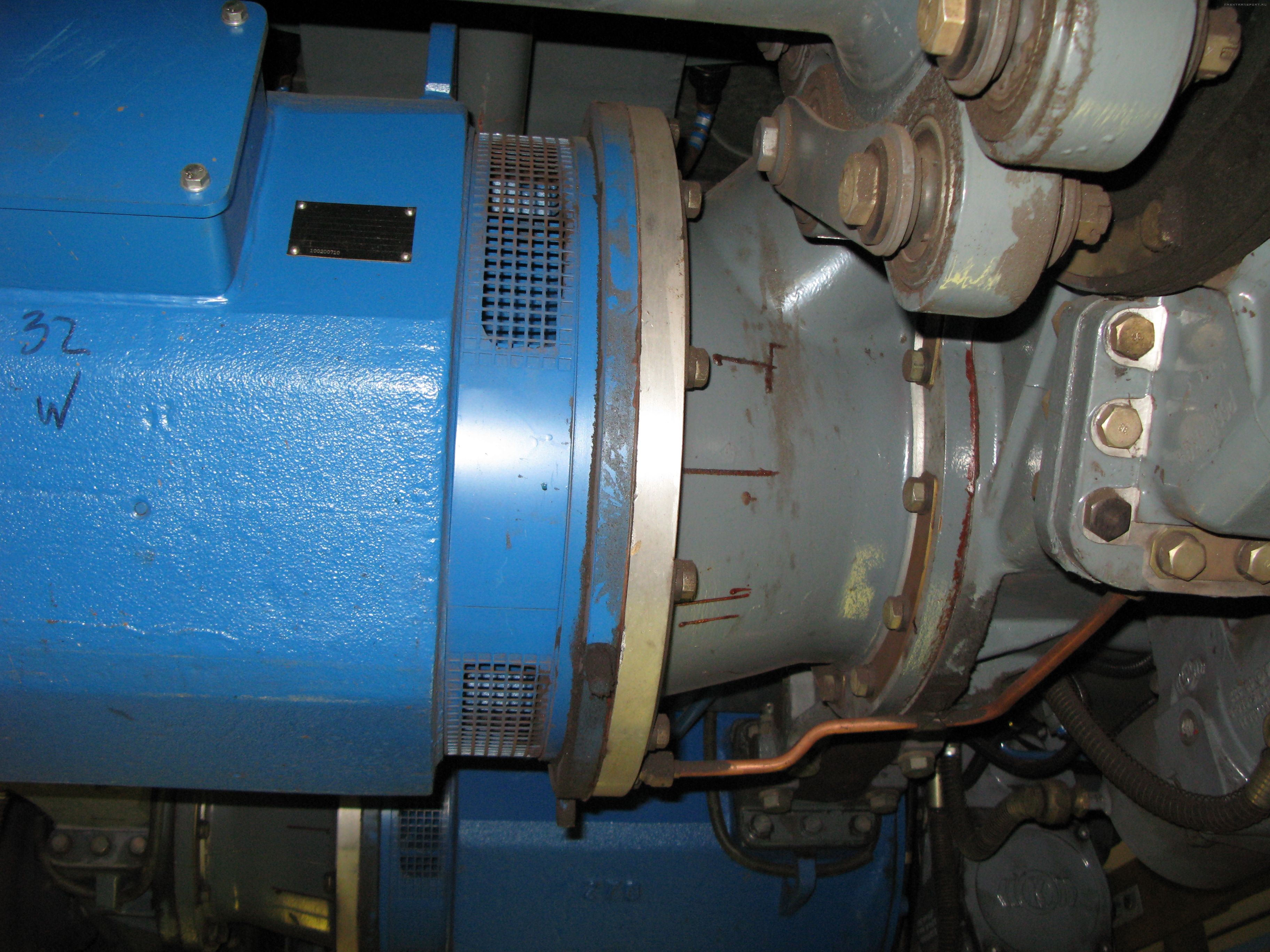 Тяговый электродвигатель на тележке электропоезда метро 81-760-761